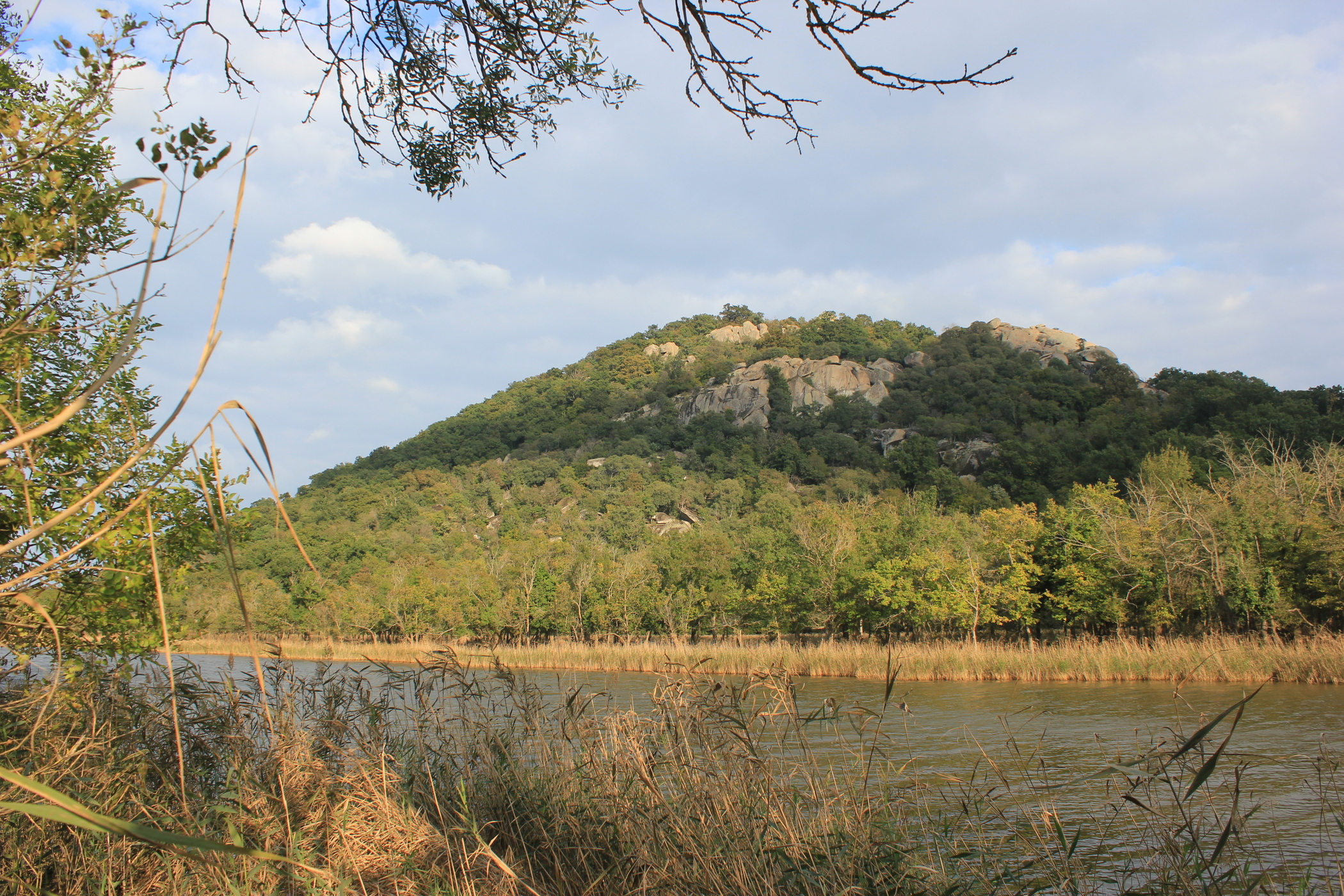 Der Fluss Ropotamo kurz vor der Mündung ins Schwarze Meer (Bulgarien).